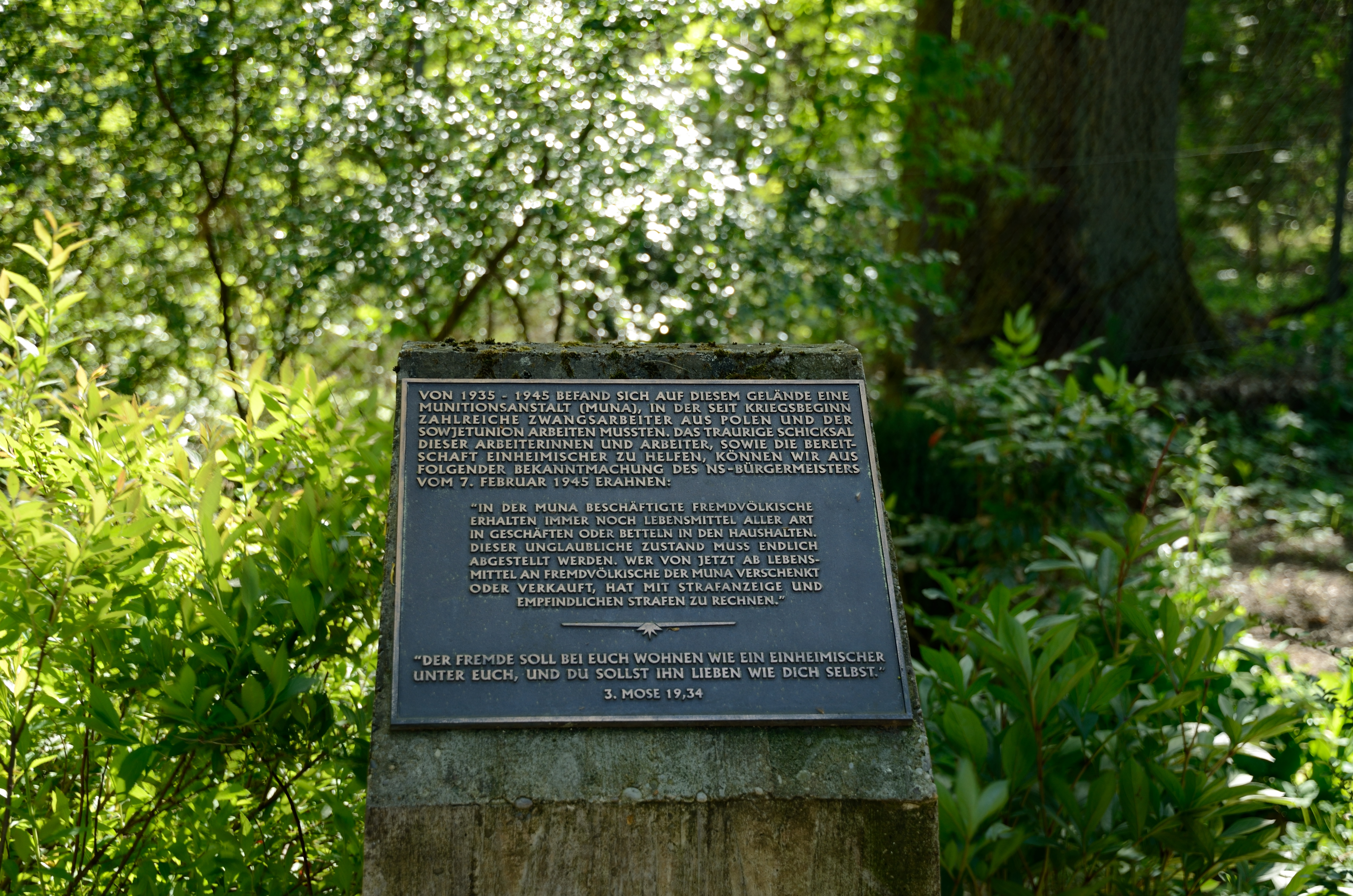 Mahnmal für polnische und sowjetische Zwangsarbeiter in der Munitionsfabrikation Neuendettelsau